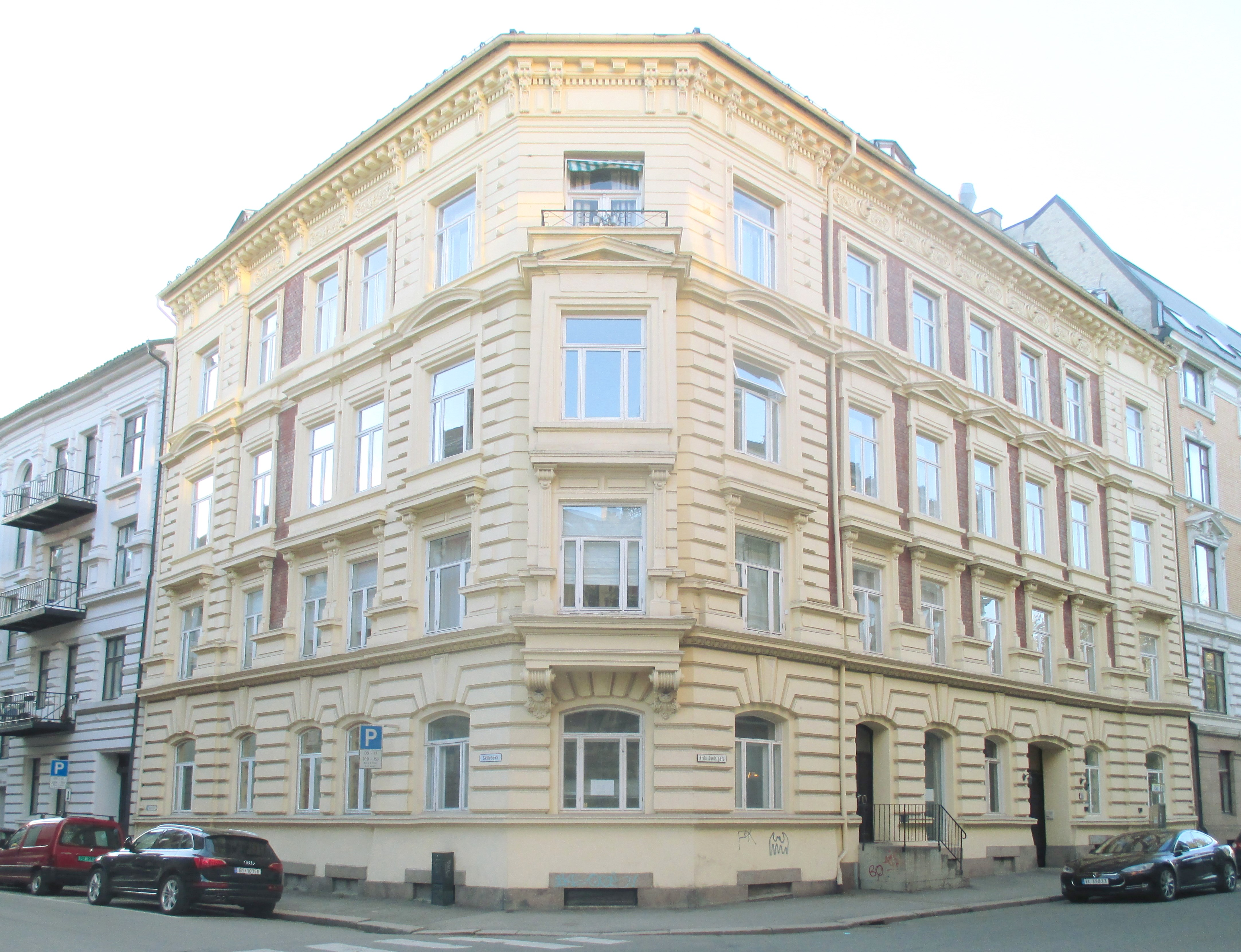 Niels Juels gate 10 (arkitekt: Marius Leyell)